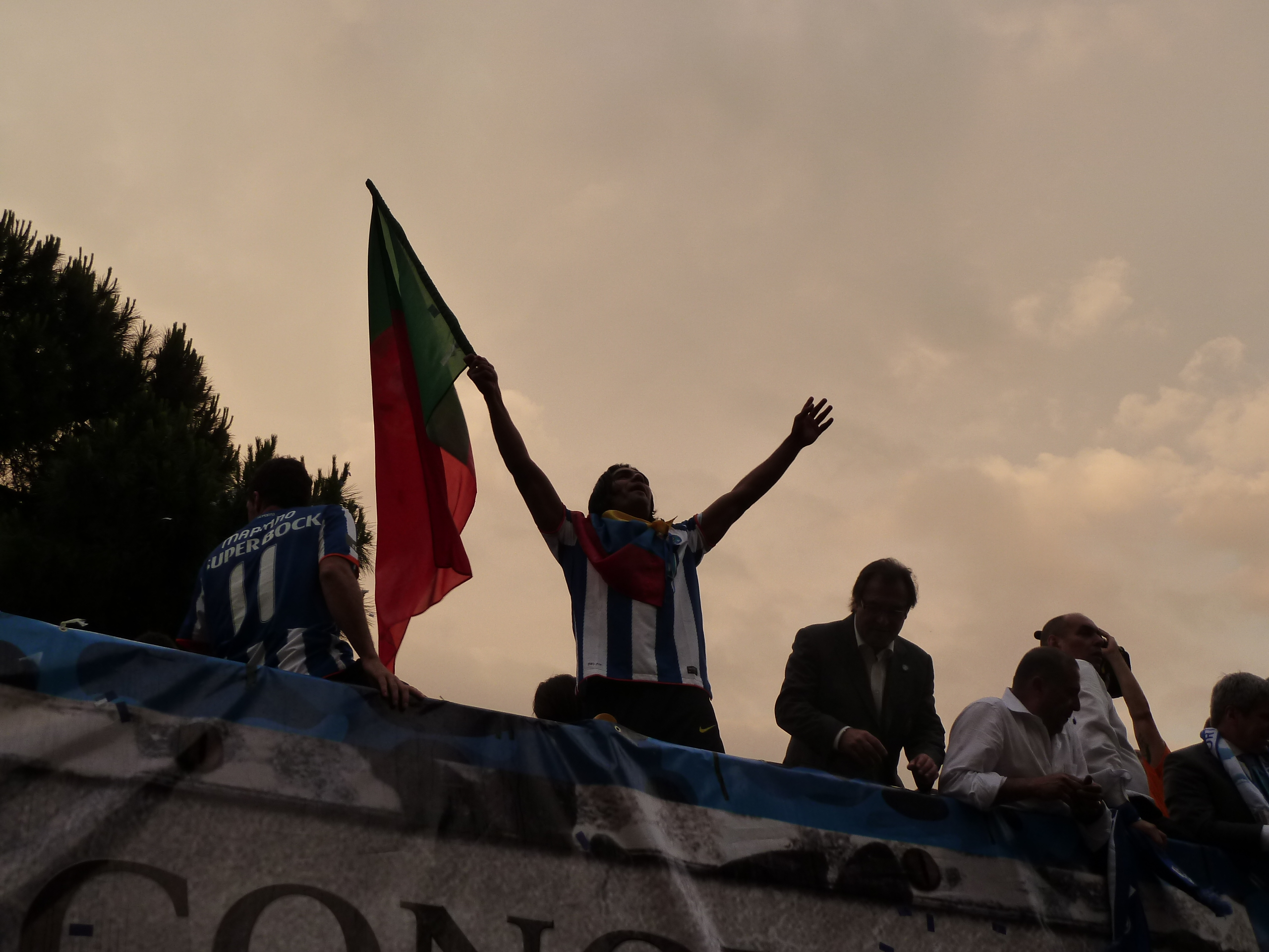 El delantero colombiano celebra el triunfo de su equipo (FC Porto) en la Liga Europa de 2011 y, en particular, su trofeo como goleador del torneo.